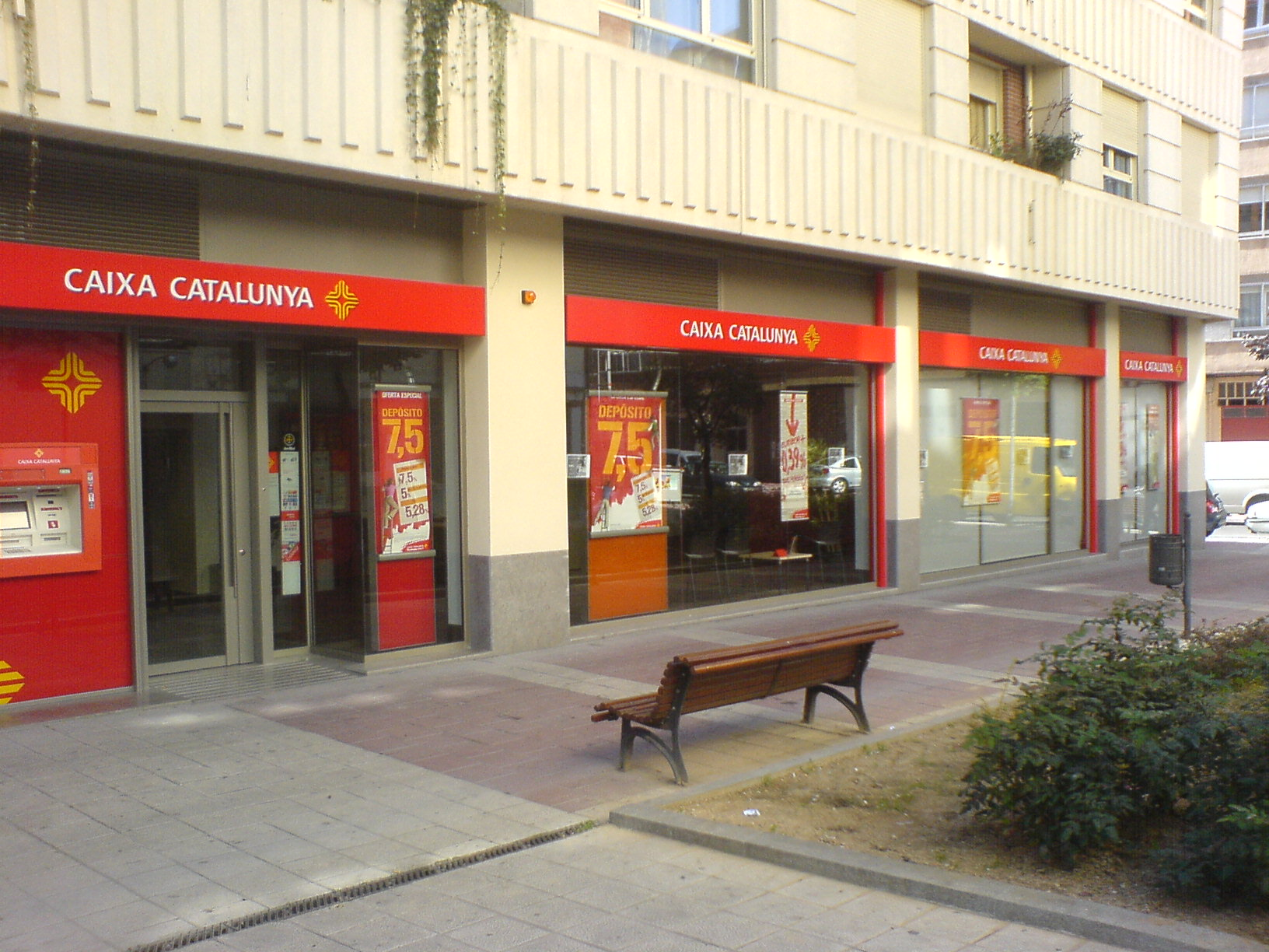 Sucursal de Caixa Catalunya en Valladolid